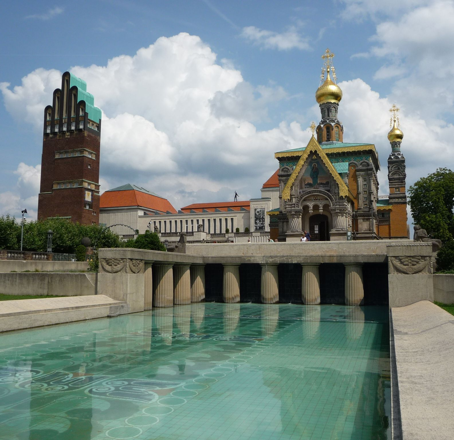 Albin-Müller-Becken mit Hochzeitsturm und Russischer Kapelle